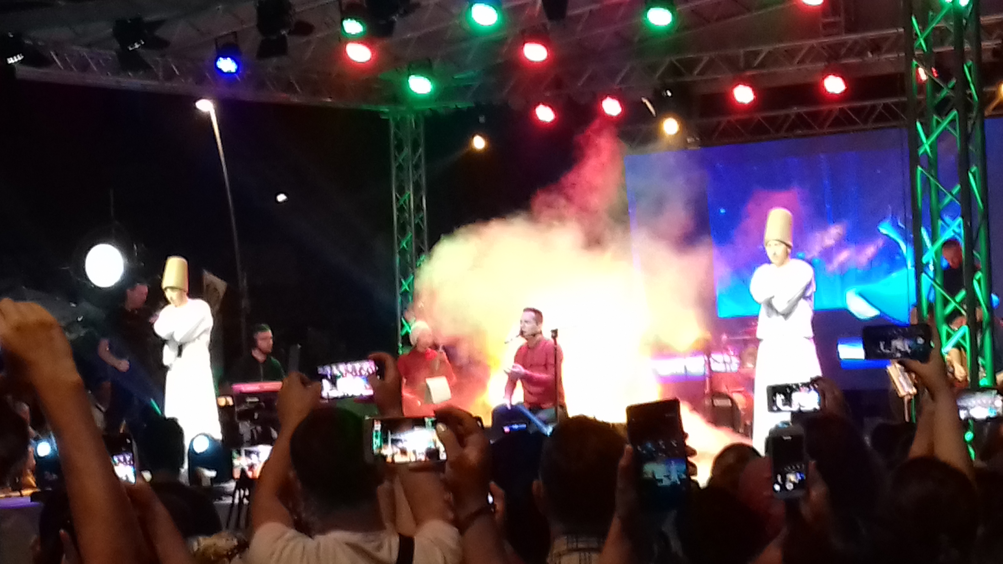 Бајрамска свечаност у Зеници 2019, Армин Музаферија и гости (Елдин Хусеинбеговић, хфз. Азиз Алили и др.)